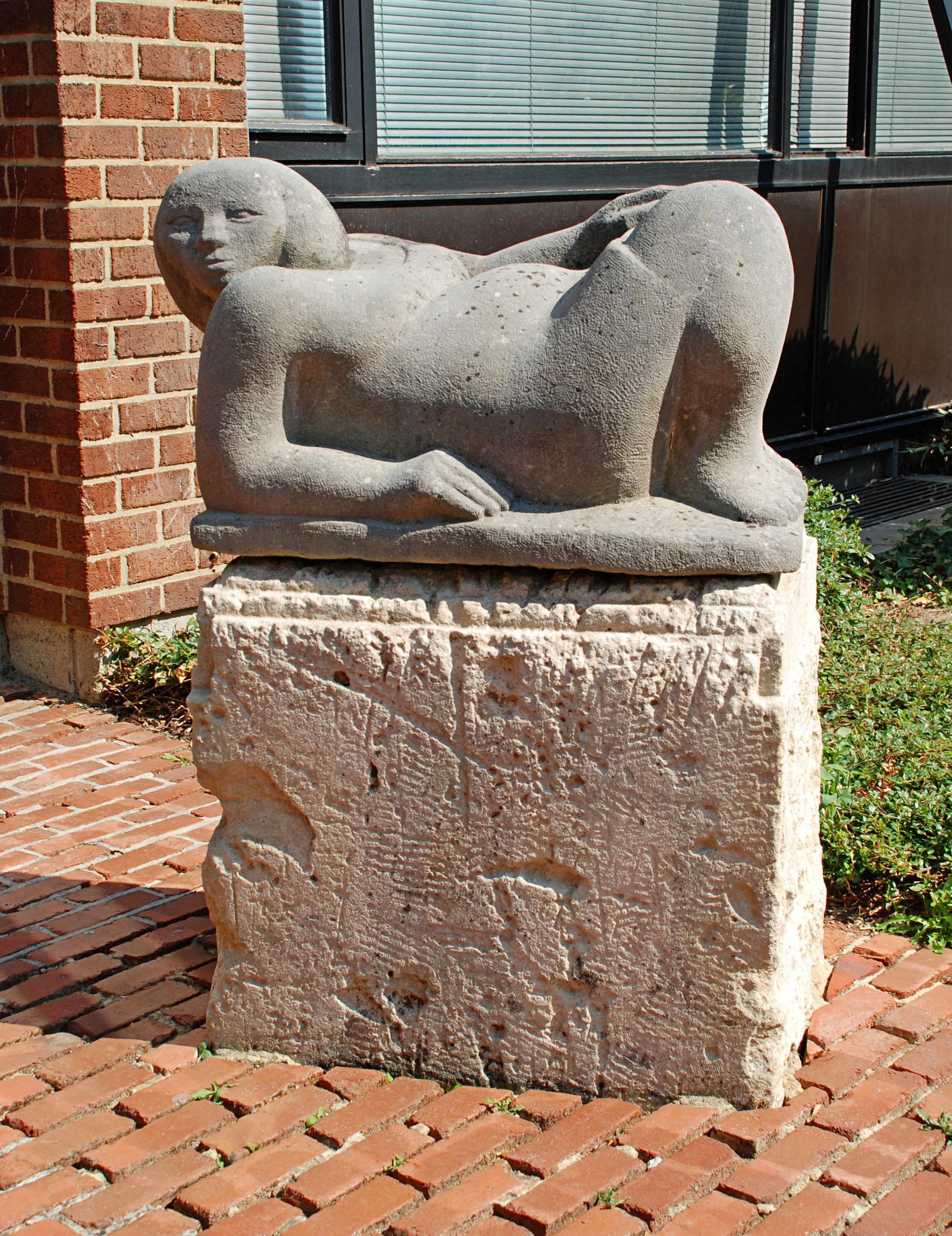 Belgique - Louvain-la-Neuve - rue Archimède - Bonheur - Jean-Marie Abel (2003) This photo of immovable heritage has been taken in the Walloon Region